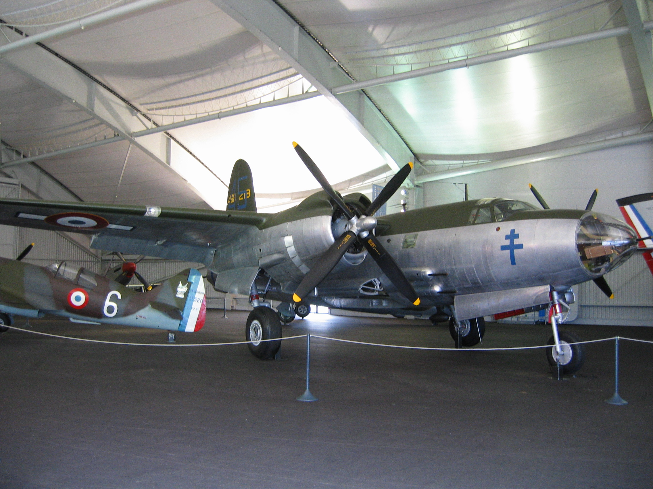 Martin B-26 aufgenommen im Luftfahrtmuseum Le Bourget (Paris)